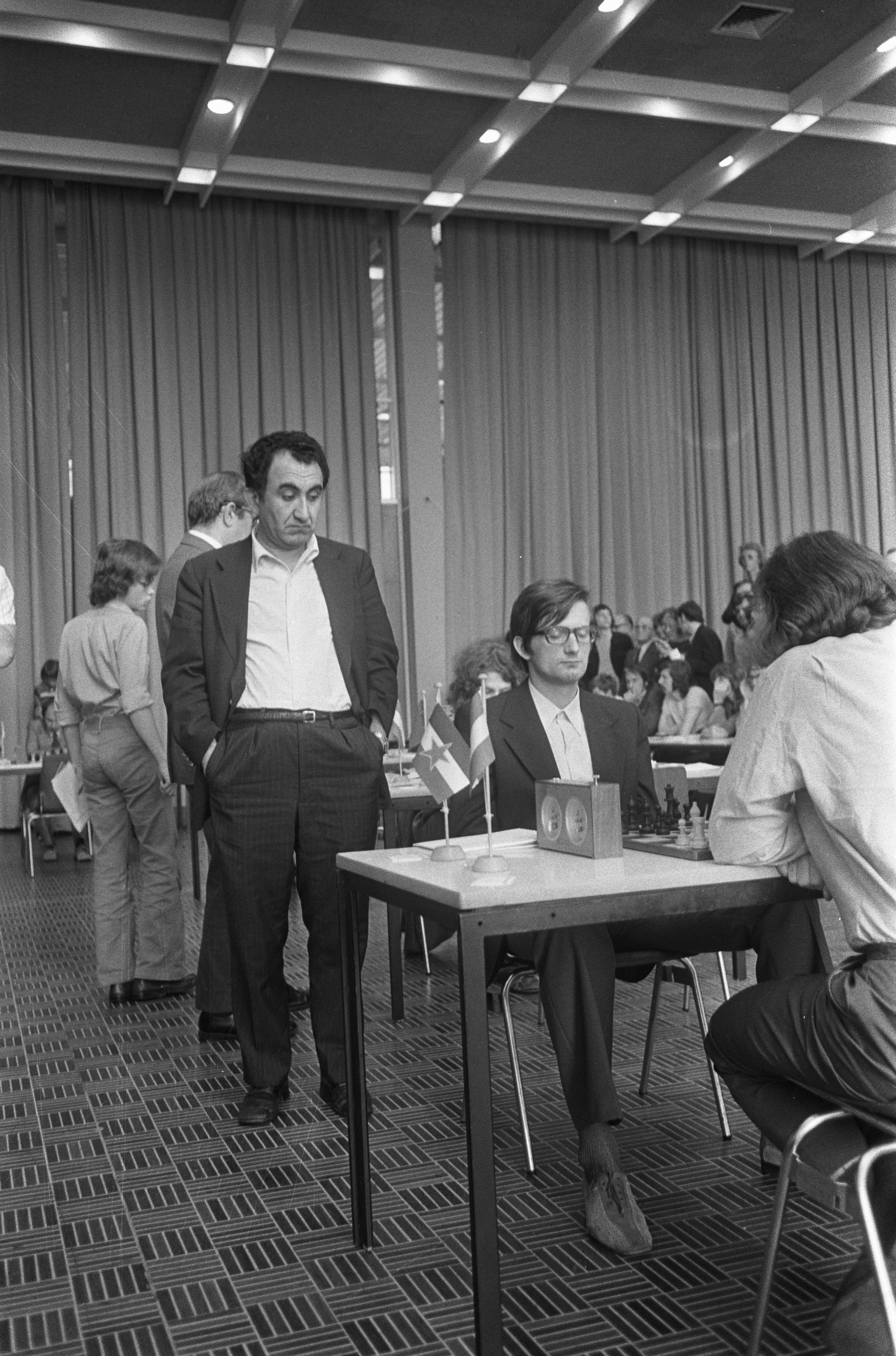 Collectie / Archief : Fotocollectie Anefo Reportage / Serie : [ onbekend ] Beschrijving : Laatste ronde IBM-schaaktoernooi, Petrosjan (links) kijkt toe bij Planinc Datum : 4 augustus 1973 Trefwoorden : schaken Persoonsnaam : Petrosian, Tigran Instellingsnaam : IBM-Schaaktoernooi Fotograaf : Croes, Rob C. / Anefo Auteursrechthebbende : Nationaal Archief Materiaalsoort : Negatief (zwart/wit) Nummer archiefinventaris : bekijk toegang 2.24.01.05 Bestanddeelnummer : 926-5903